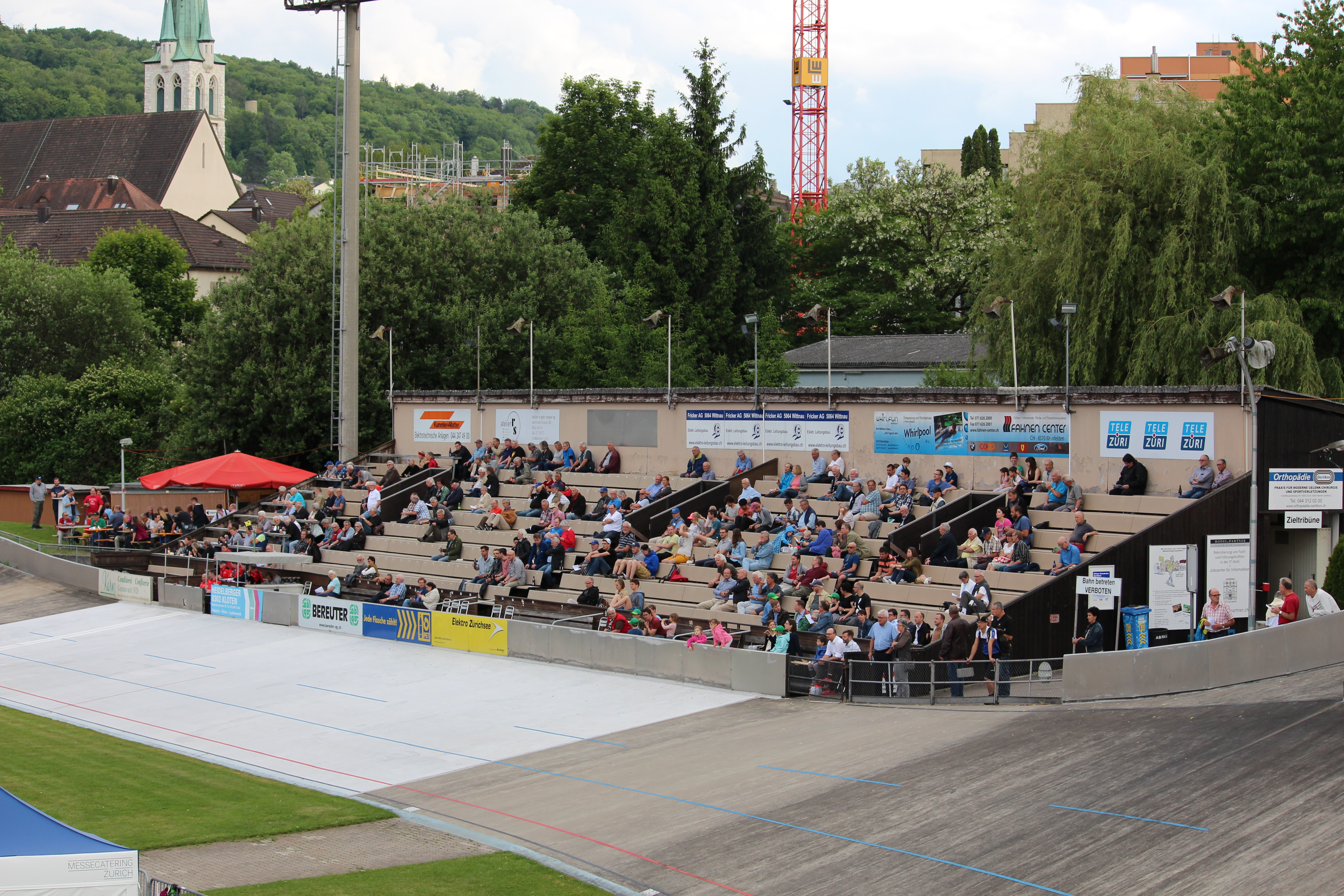 Das Radrennen in der offenen Rennbahn Zürich-Oerlikon vom 23. Mai 2017